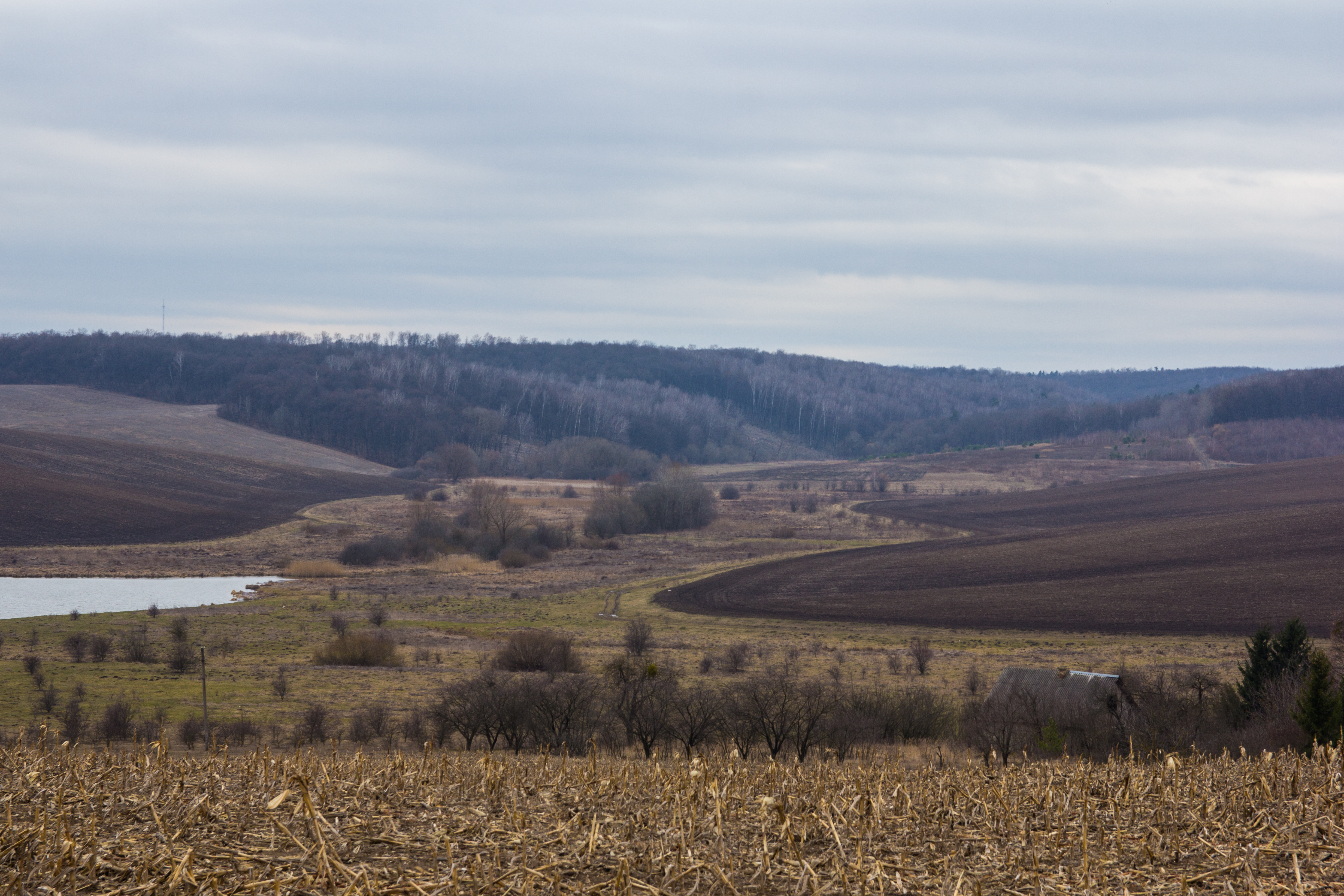 Гориньград, Рівненський район, Олександрійське л-во: кв. 47, вид. 17, 18